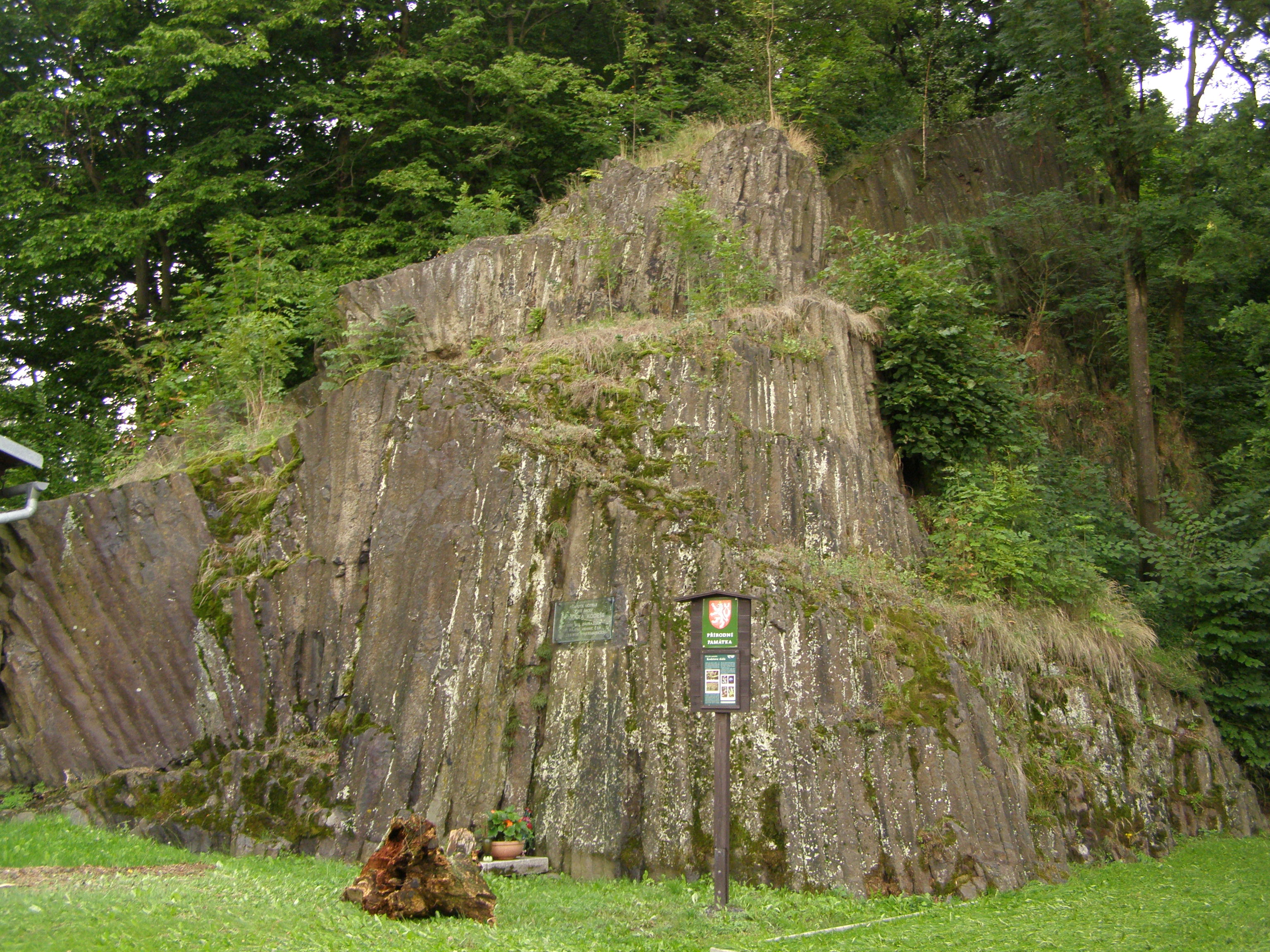 Heřmanice, přírodní pamánka Kodešova skála